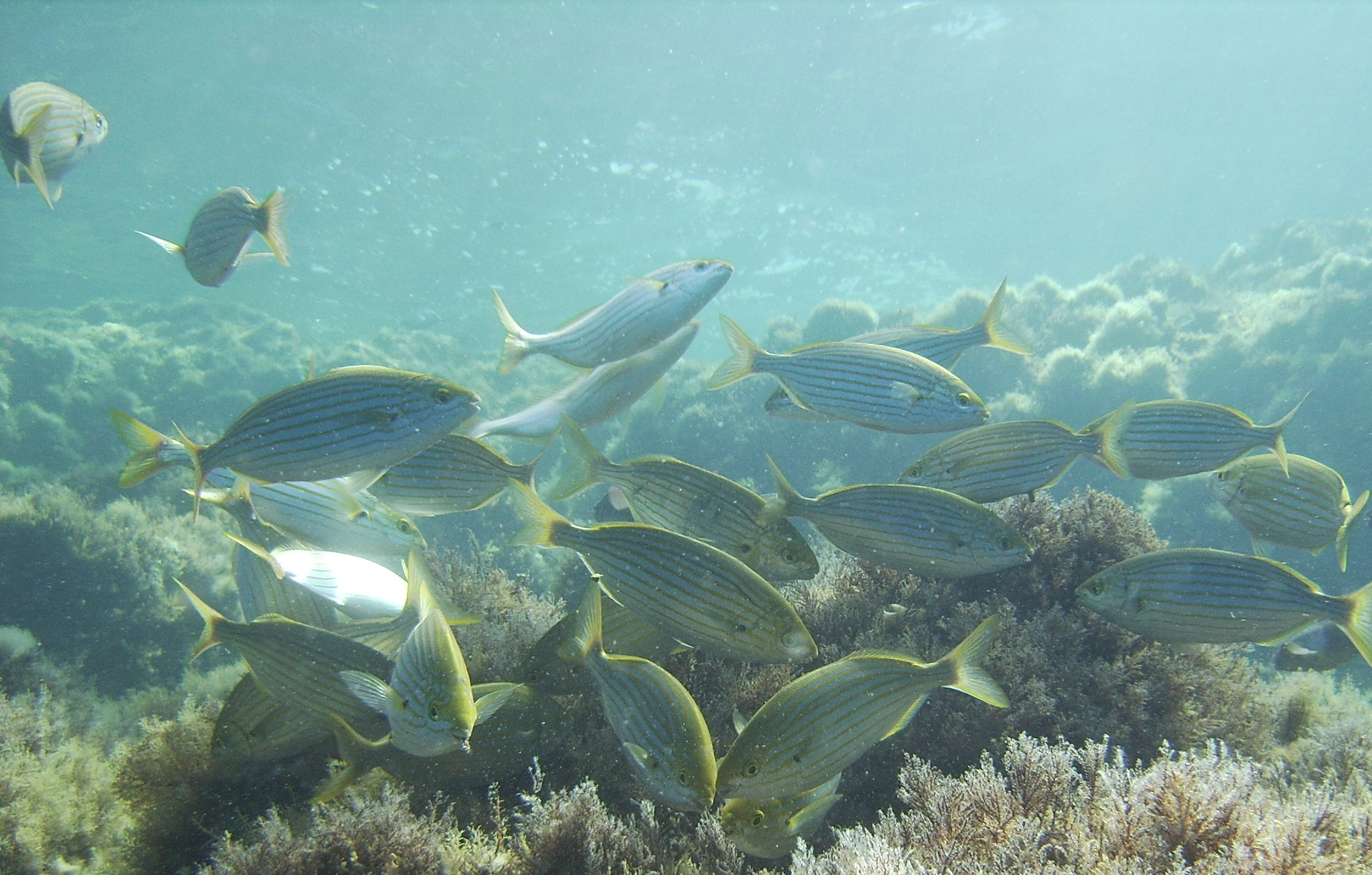 Goldstriemen bei der Futteraufnahme